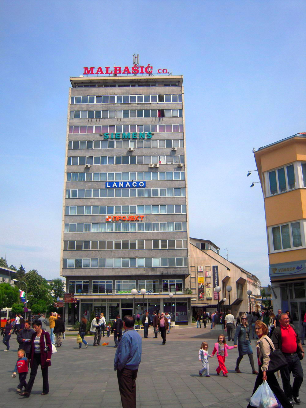 Trg_Krajine,čajavčev_i_ulaz_u_gospodsku